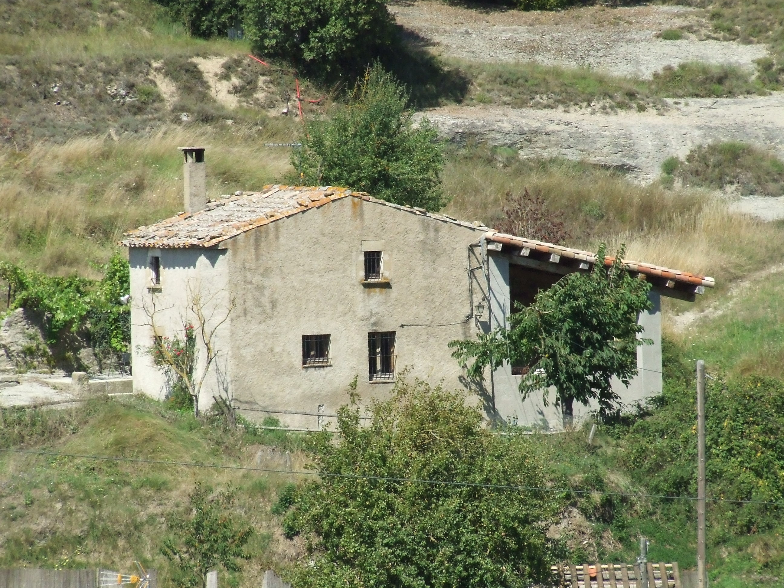 Can Gregori (Castellcir, Moianès)